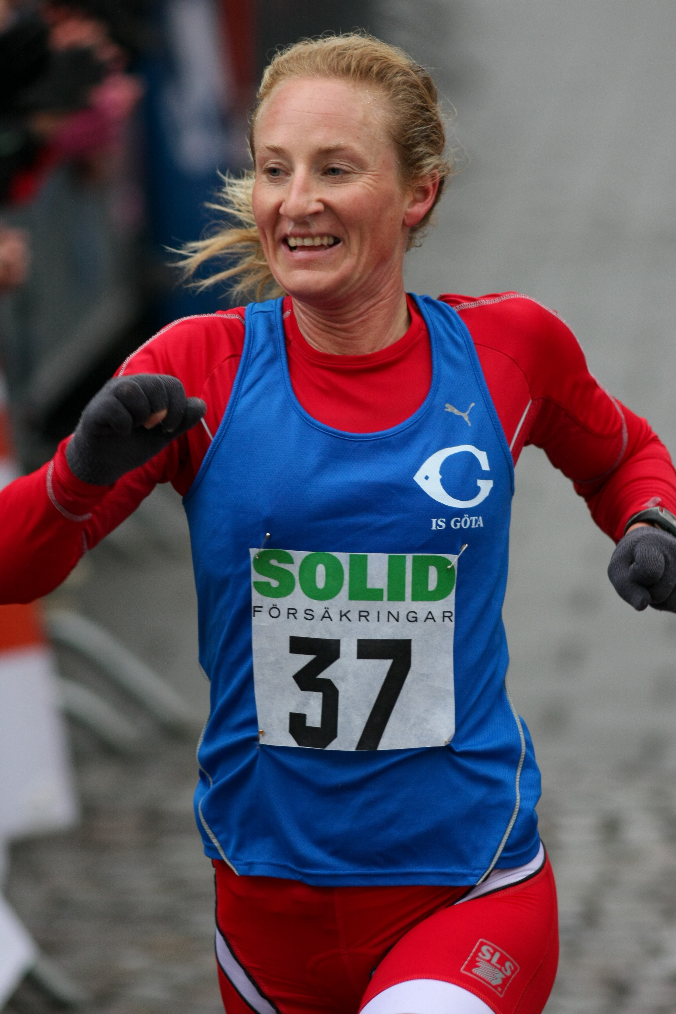 Camilla Lindholm 2010